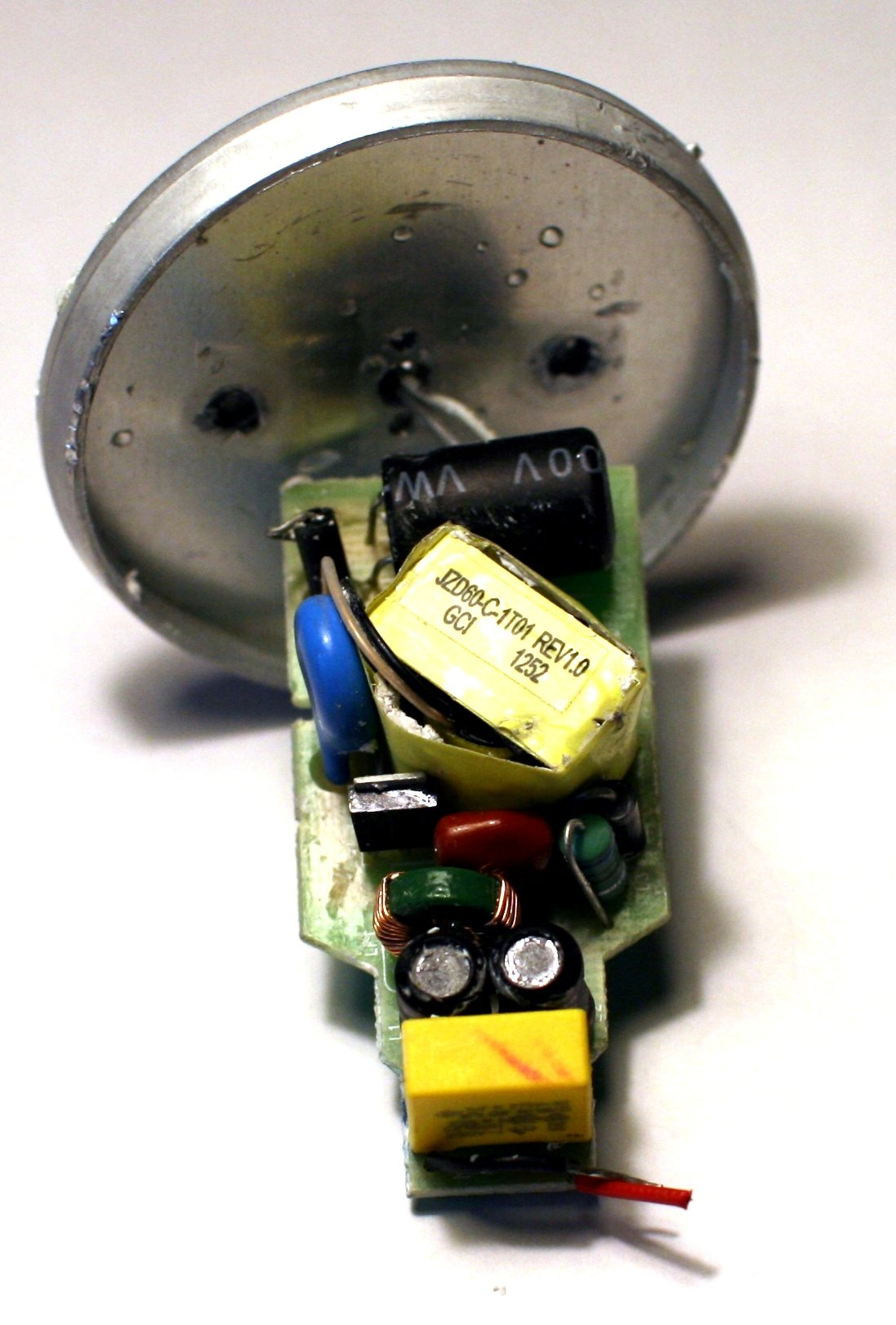 LED-Retrofit-Lampe Rückseite mit freigelegter Elektronik